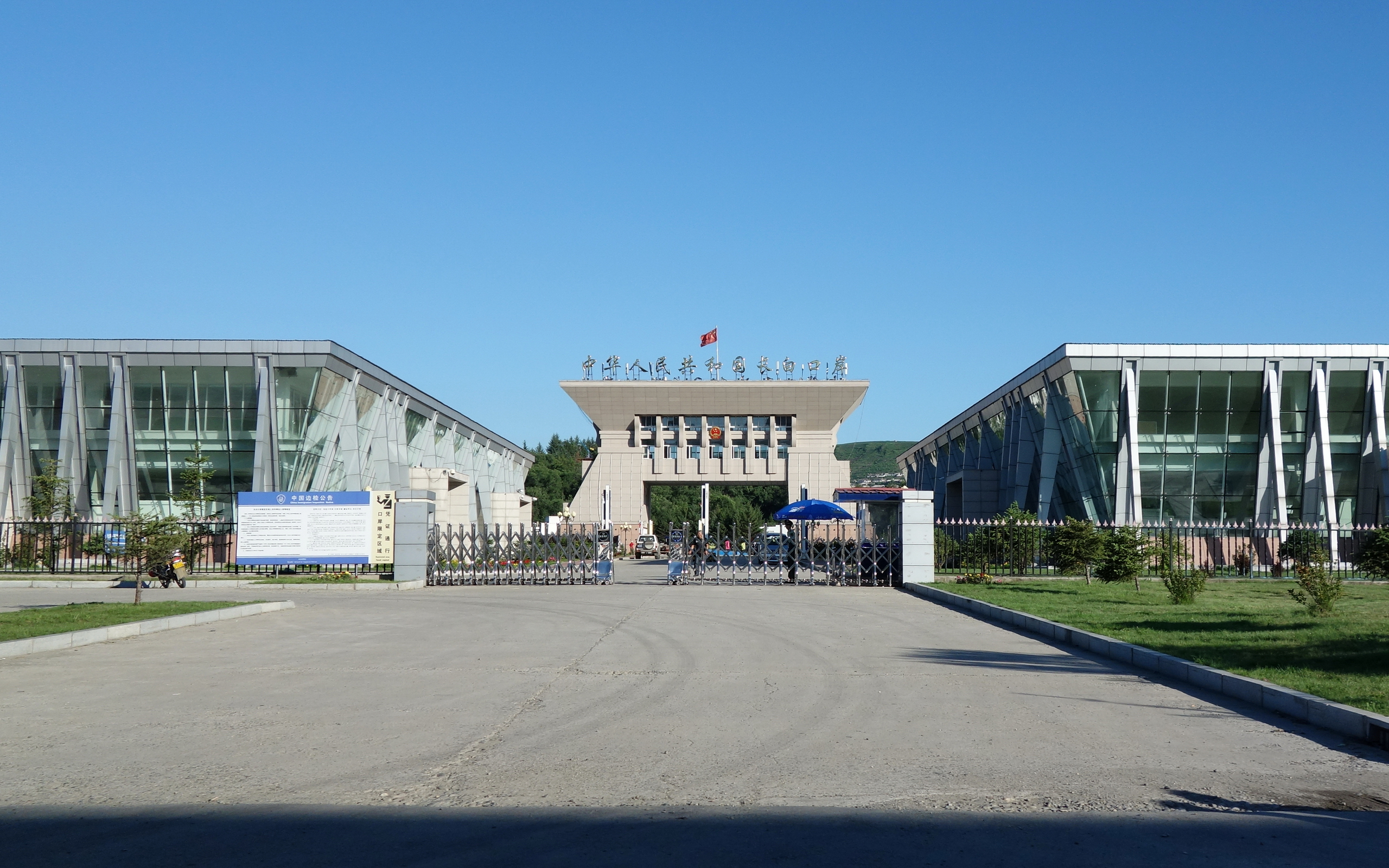 中国长白邊境口岸, 位于吉林省白山市长白朝鲜族自治县长白镇